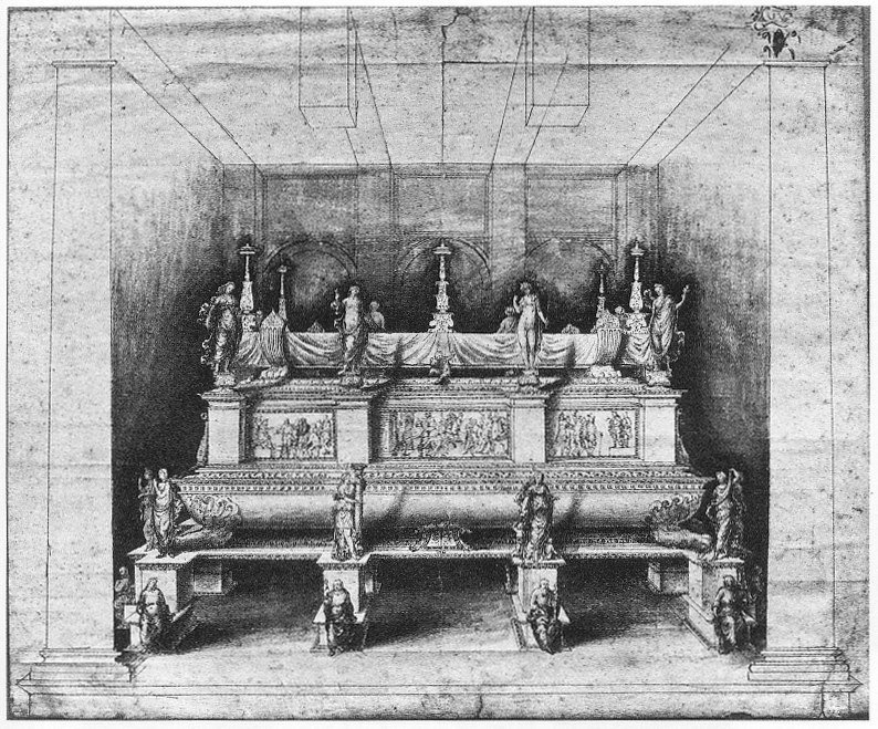 Projet de monument funéraire (Gaston de Foix ?), dessin, Albert and Victoria Museum, Londres